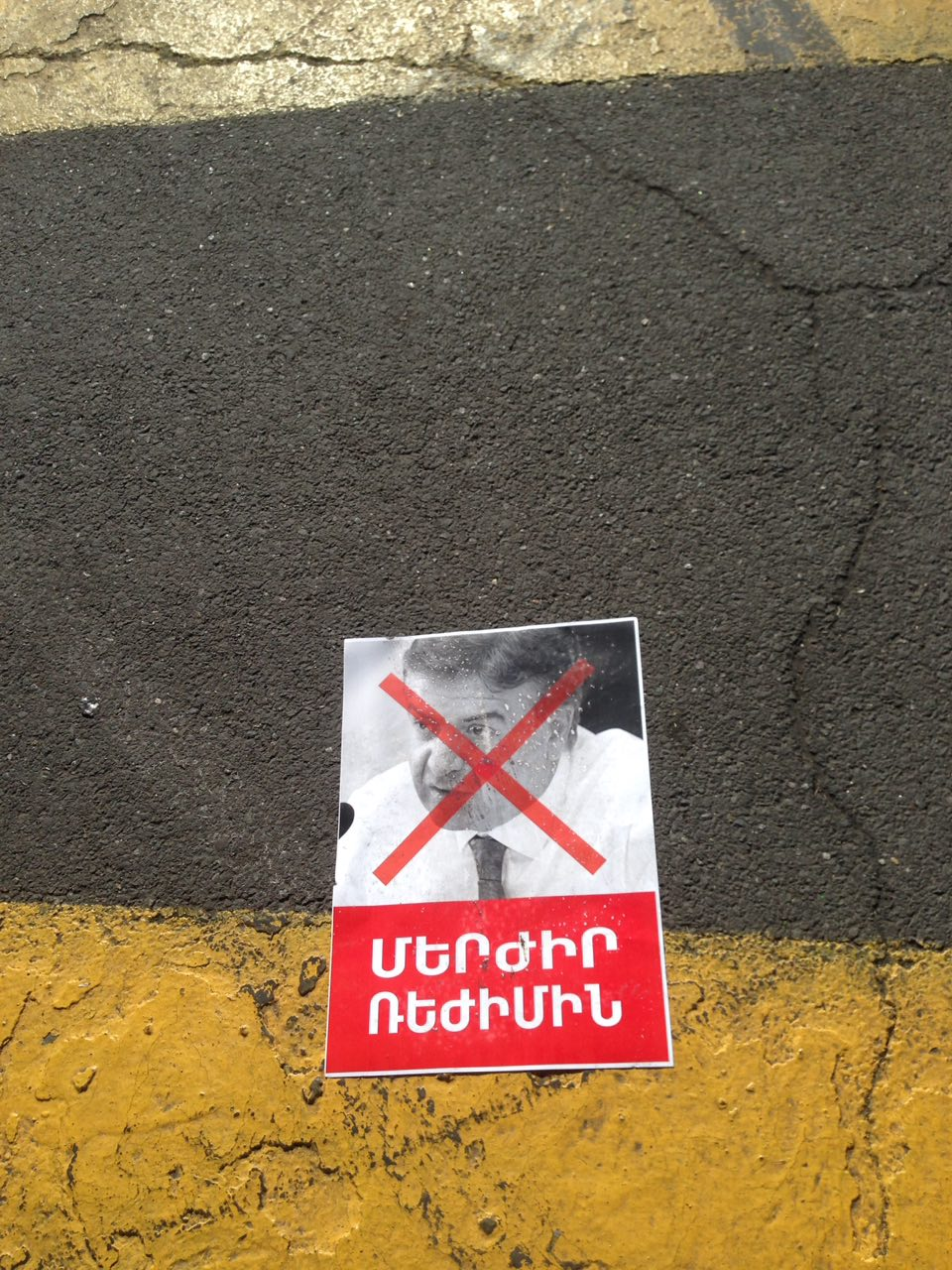 Մերժիր ռեժիմին, ապրիլի 25, Երևան